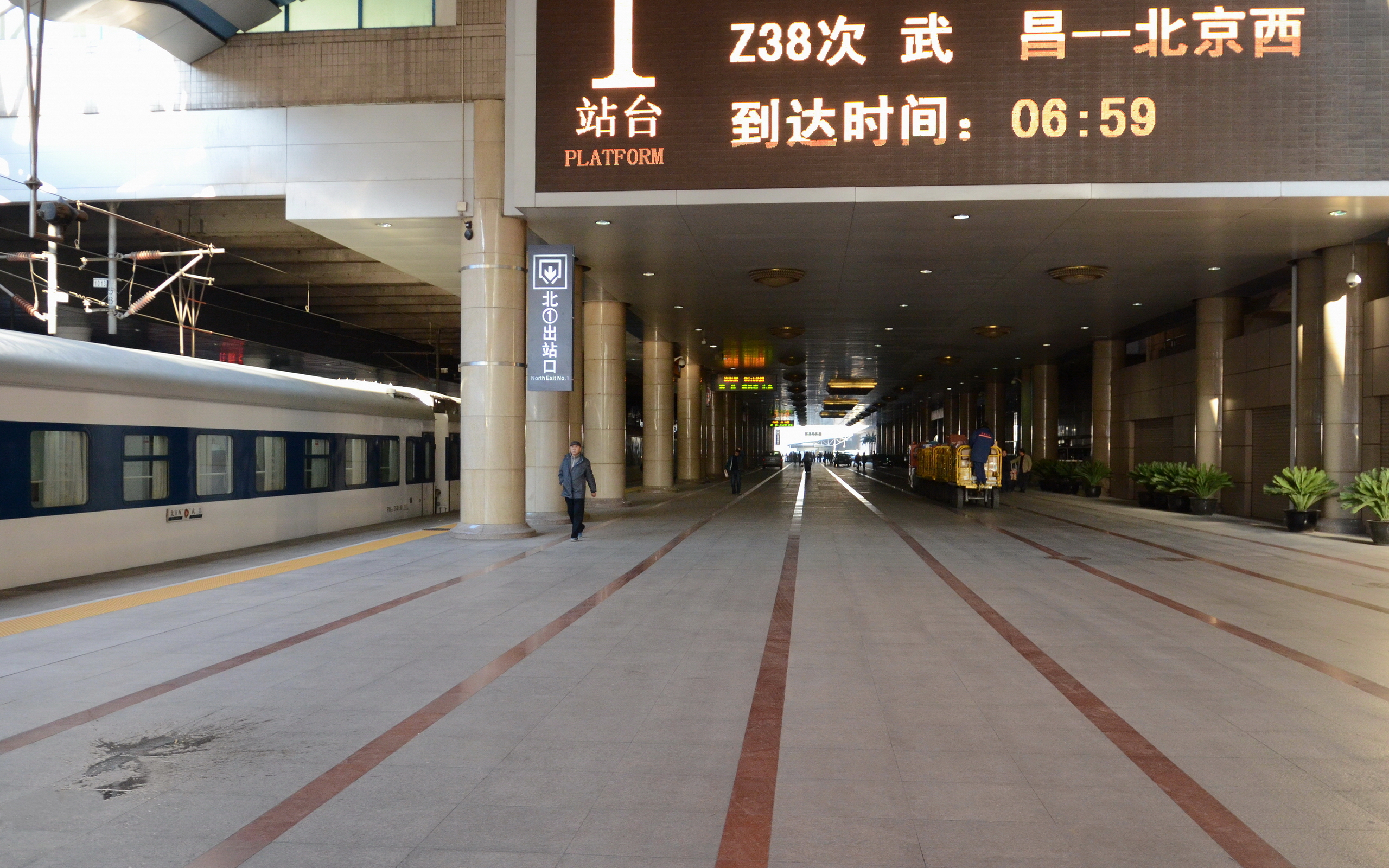 北京西客站1号站台